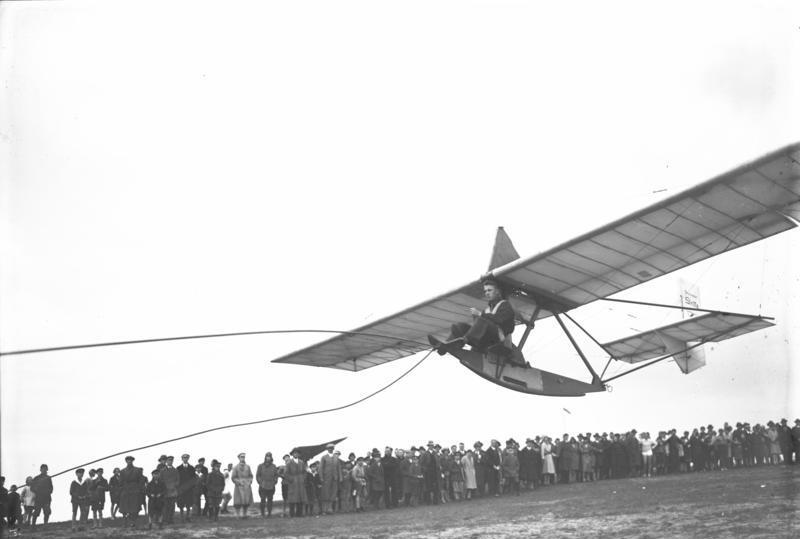 Unsere Studenten lernen Segelfliegen! Ein vorzüglich gelungener Start eines Segelflugzeuges der Deutschen Hochschule für Leibesübungen in den Gatower Bergen.